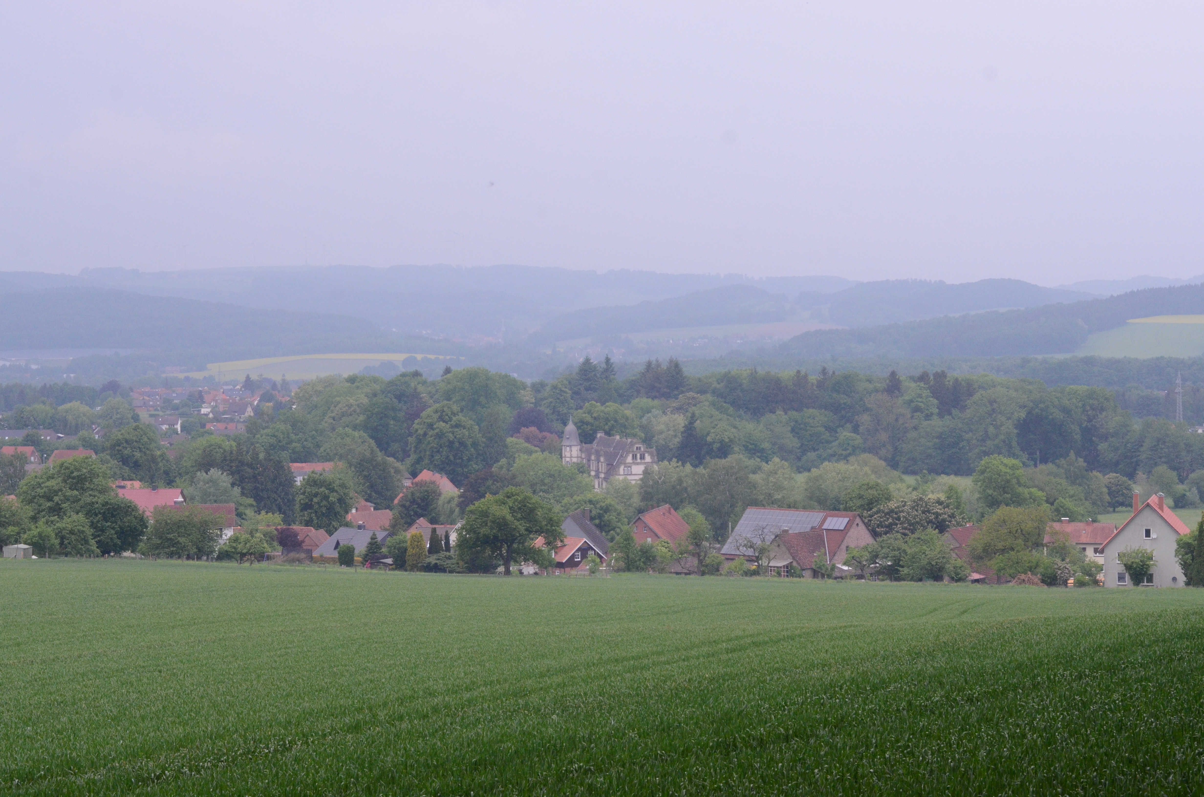 Blick vom Waldrand des Löhlbergs auf das Schloss Wendlinghausen